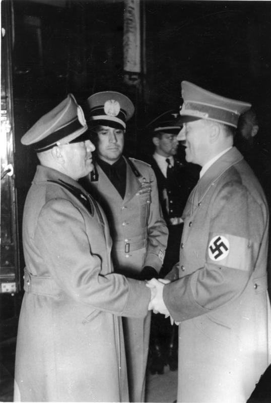 29.9.1938. Die Abreise des Duce von München. Nach Abschluß der Münchener Besprechungen verabschiedet sich der Duce auf das Herzlichste vom Führer, der ihn zum Bahnhof begleite hatte. In der Mitte der italienische Außenminister Graf Ciano.